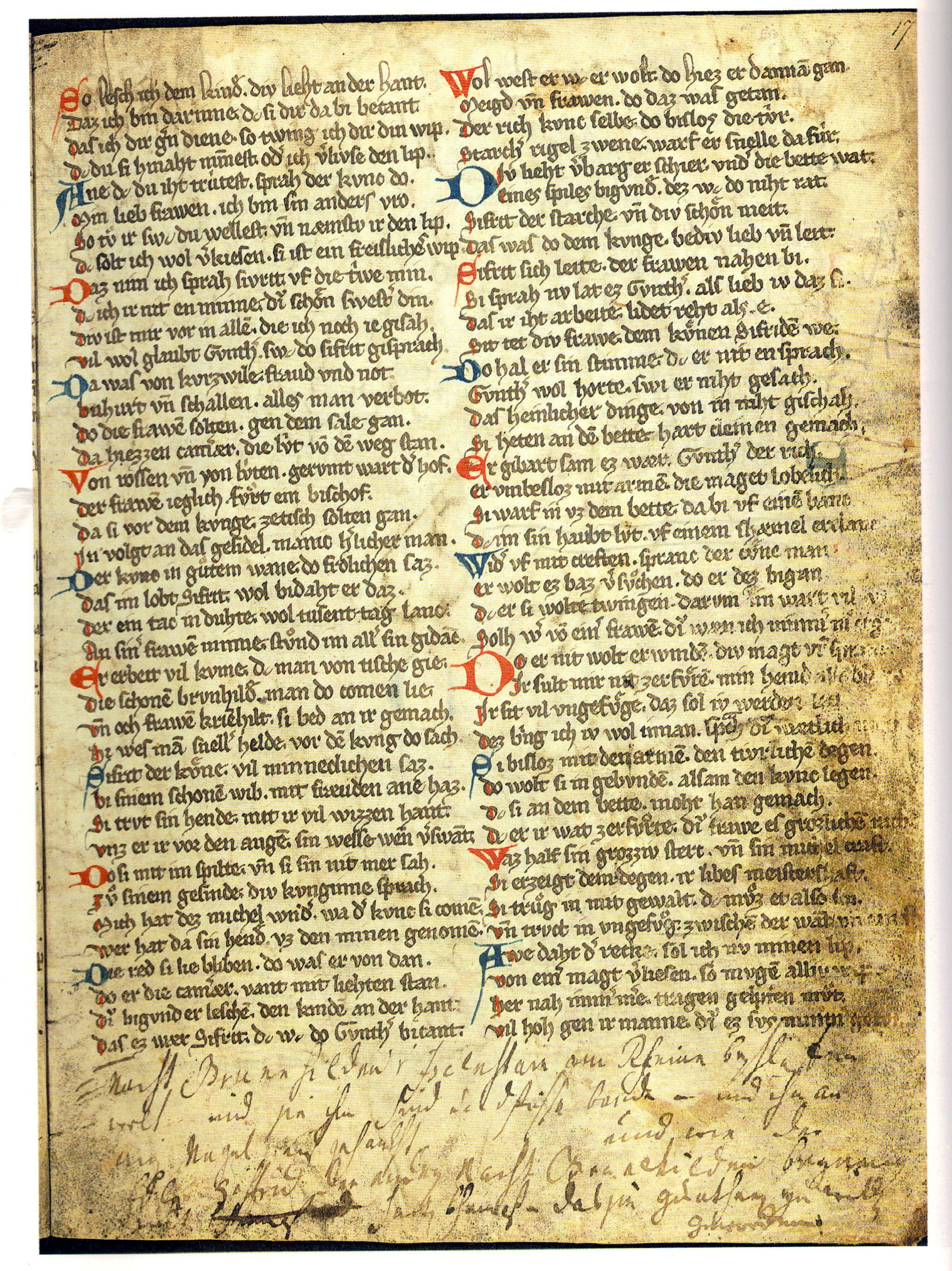 Nibelungenlied, Berlin, SB, mgf 474, Bl. 17r